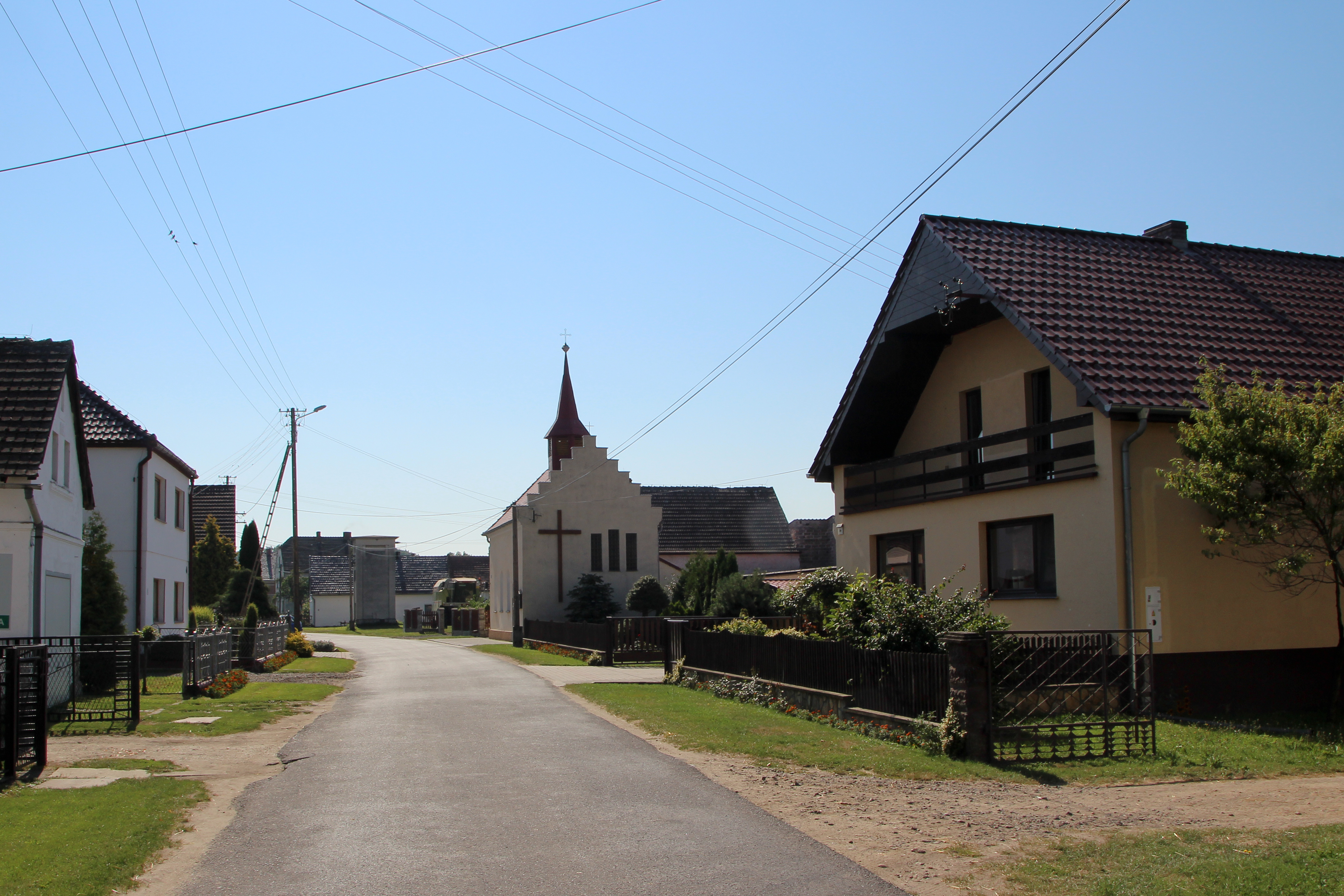 Piechocice – wieś w Polsce, w województwie opolskim, w powiecie nyskim, w gminie Korfantów.